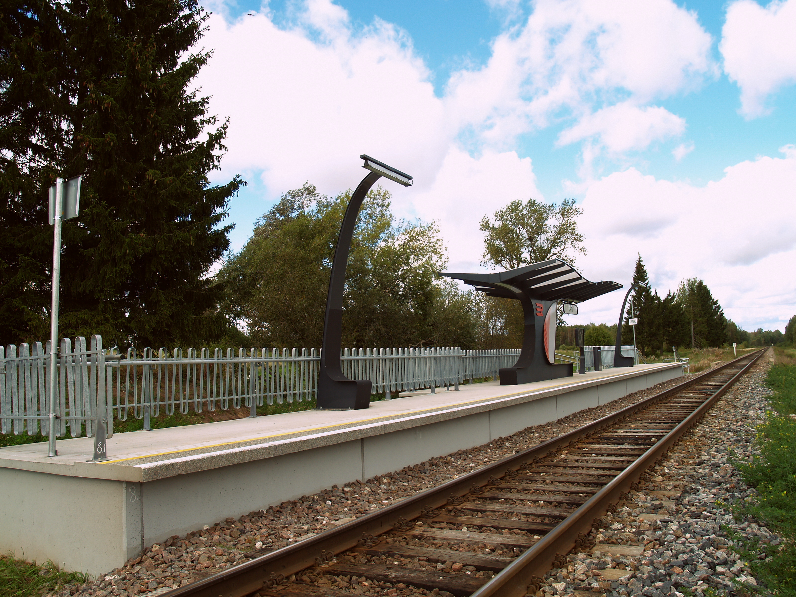 Uhti raudteepeatus